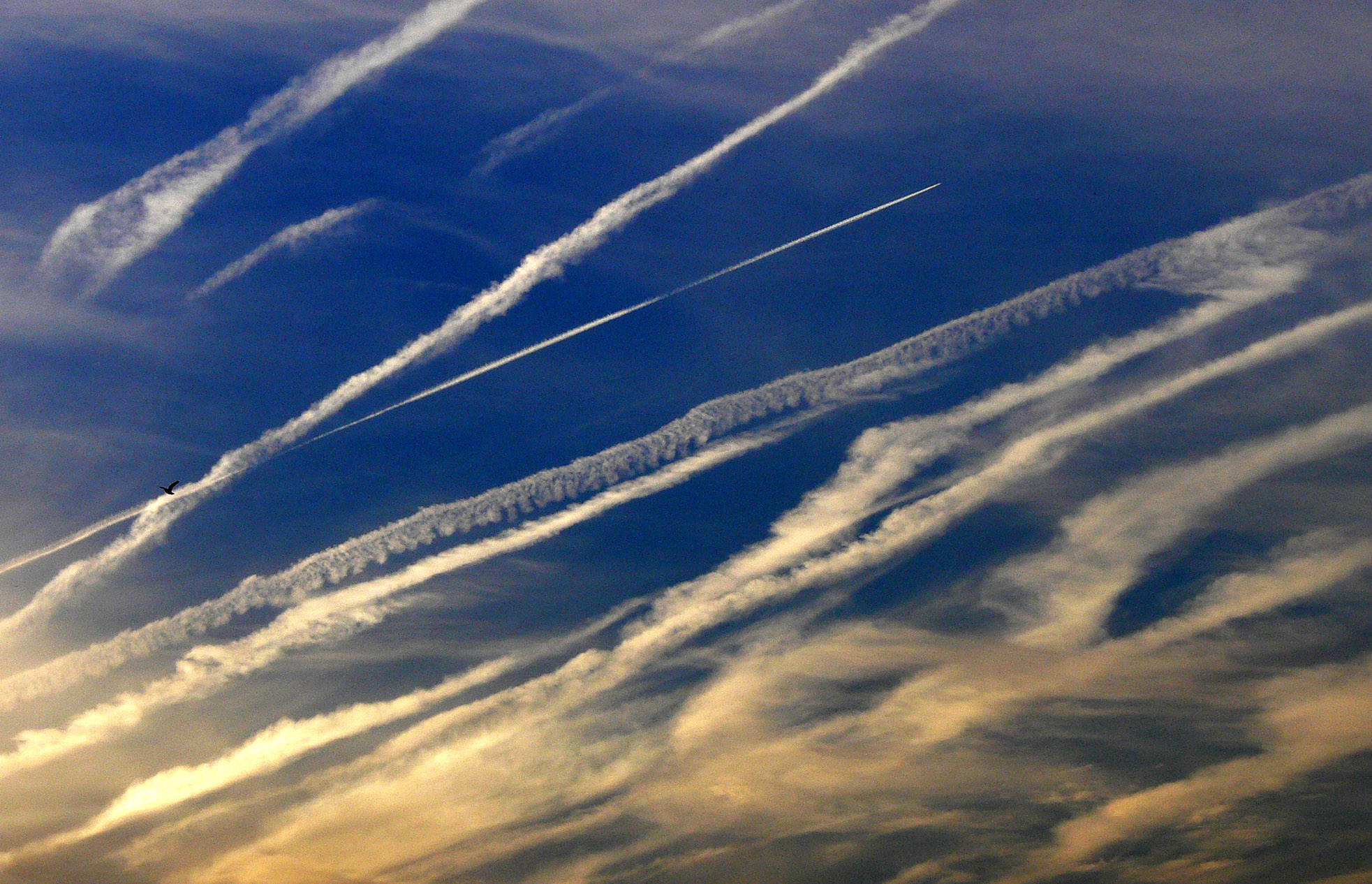 Ce ciel couchant photographié à Lille, dans le nord de la France, en regardant vers l'Ouest/Nord-Ouest, peu avant le coucher du soleil, le 12 juin 2006 met en évidence les différentes formes de nuages produits par les trainées d'avion. Le fond nuageux ainsi produit interfère avec le climat (refroidissement le jour, réchauffement la nuit (voir Traînée de condensation ) Source : F. Lamiot, avec autorisation / Licence